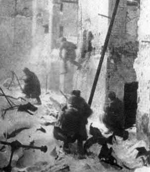 Streetfight inside Stalingrad.